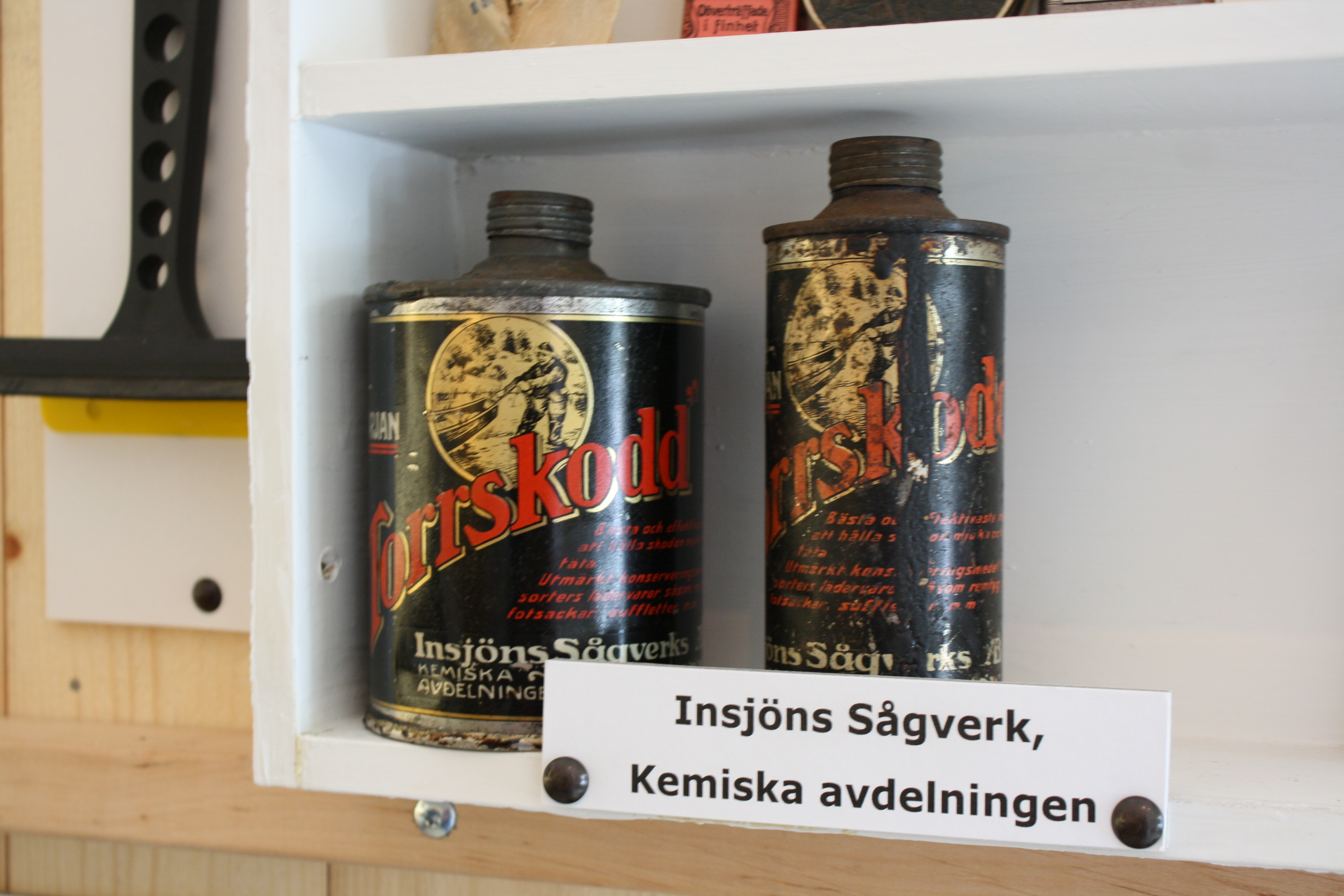 Bild från Företagsmuseet i Åhl i gamla Åhlenspaviljongen på Hjultorget i Insjön. Torrskodd, impregnering från Insjöns sågverk.